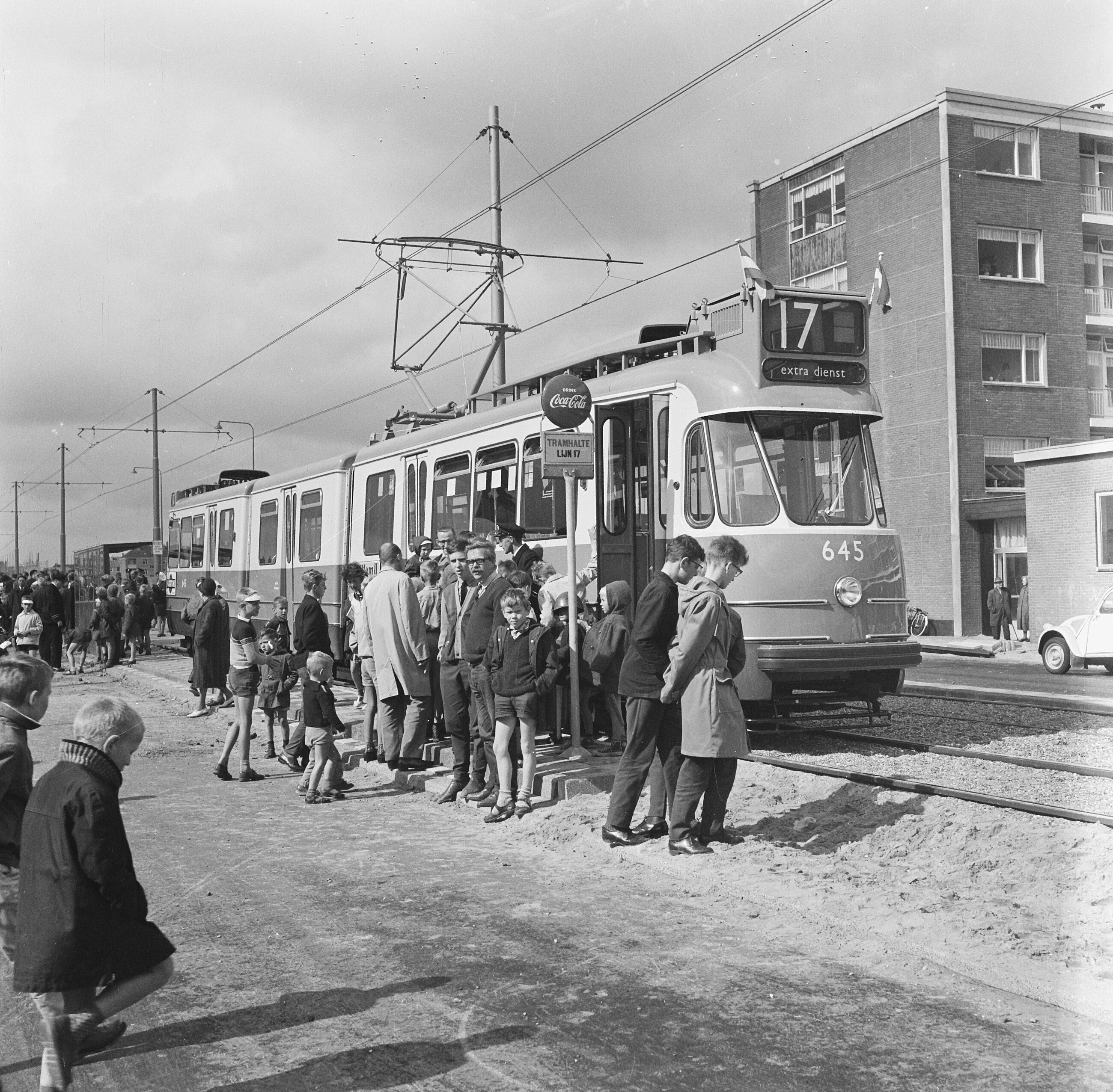 Collectie / Archief : Fotocollectie Anefo Reportage / Serie : [ onbekend ] Beschrijving : Lijn 17 rijdt door Osdorp Datum : 8 september 1962 Trefwoorden : trams Fotograaf : Nijs, Jac. de / Anefo Auteursrechthebbende : Nationaal Archief Materiaalsoort : Negatief (zwart/wit) Nummer archiefinventaris : bekijk toegang 2.24.01.03 Bestanddeelnummer : 914-2807